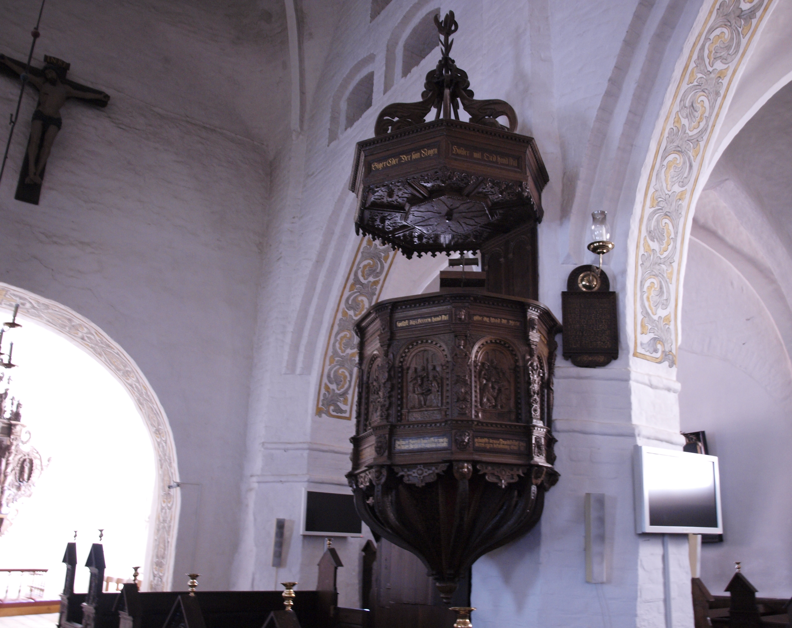 Sankt Nicolai Kirke (Middelfart Kommune) prædikestol